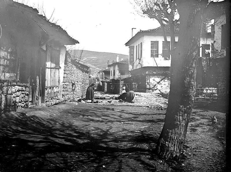 Воден